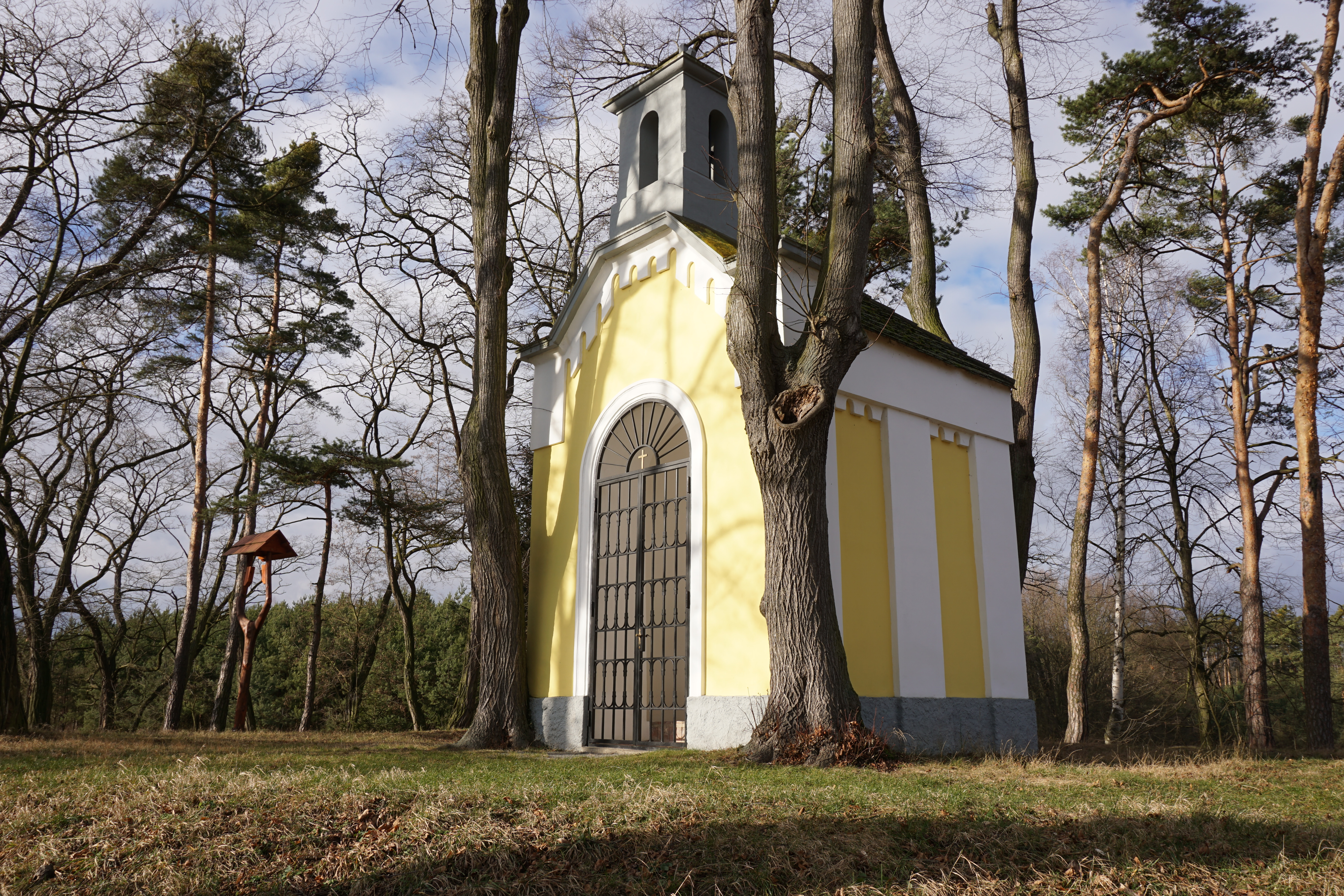 Libovice - kaple sv. Jana Nepomuckého U Jána